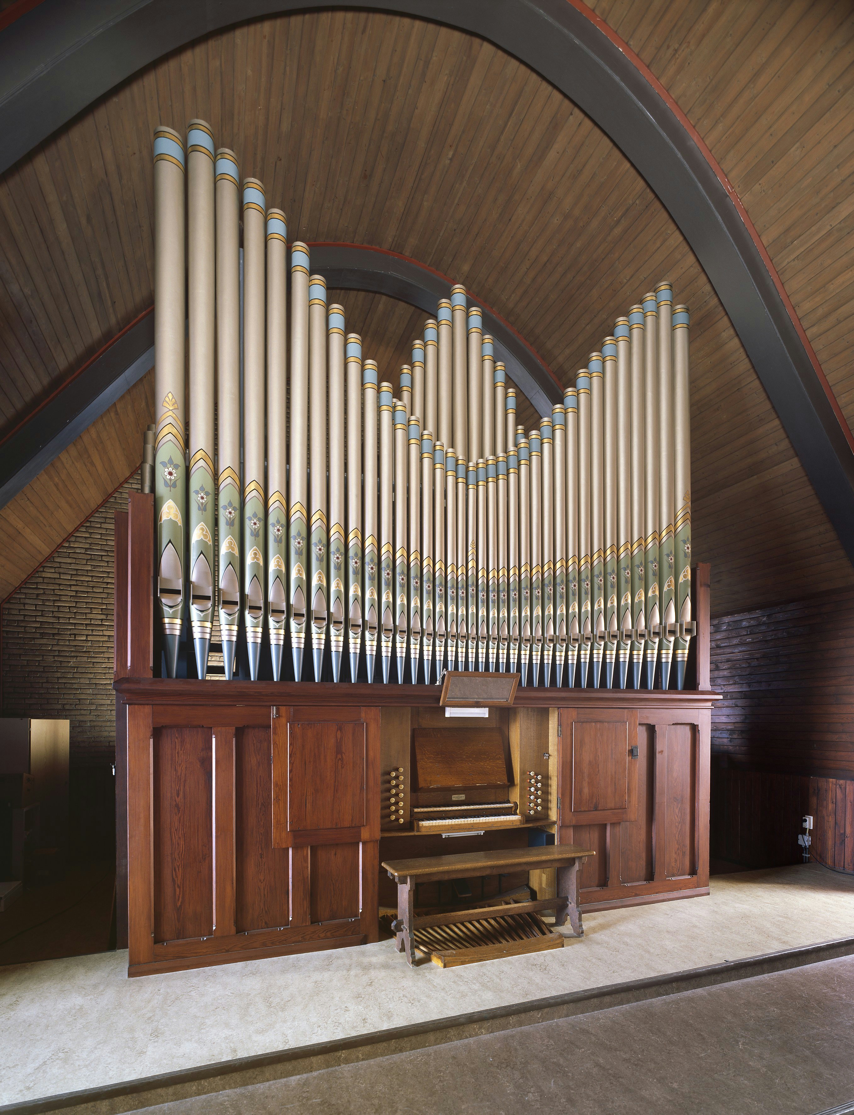 Emmauskerk: Intenieur, aanzicht orgel, orgelnummer 43 (opmerking: Gefotografeerd voor Het Historische Orgel in Nederland 1872-1878, bladzijde 130)